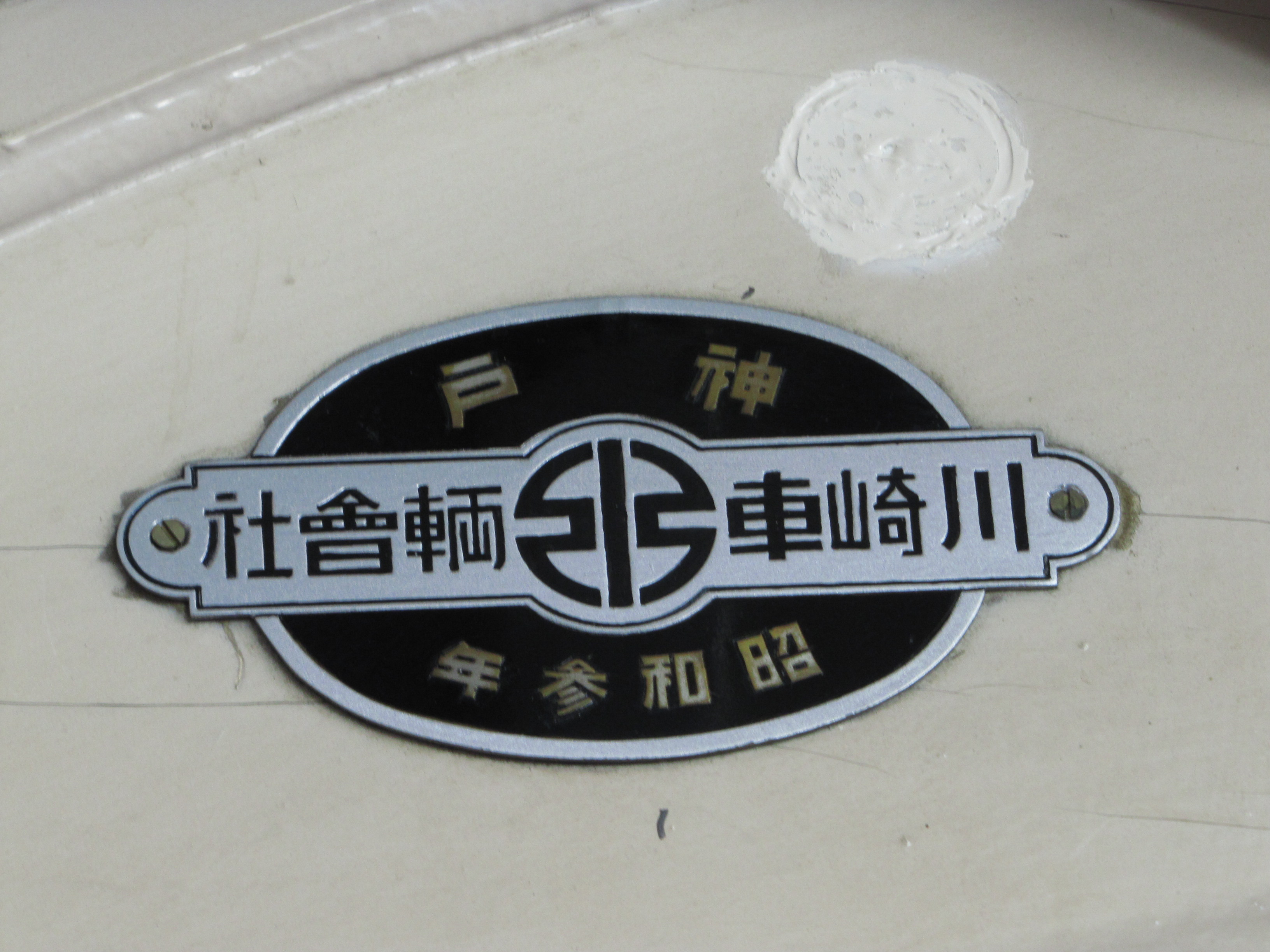 モ１６１形１６１号の車内銘板。 元々ついていた物を再生したもの。